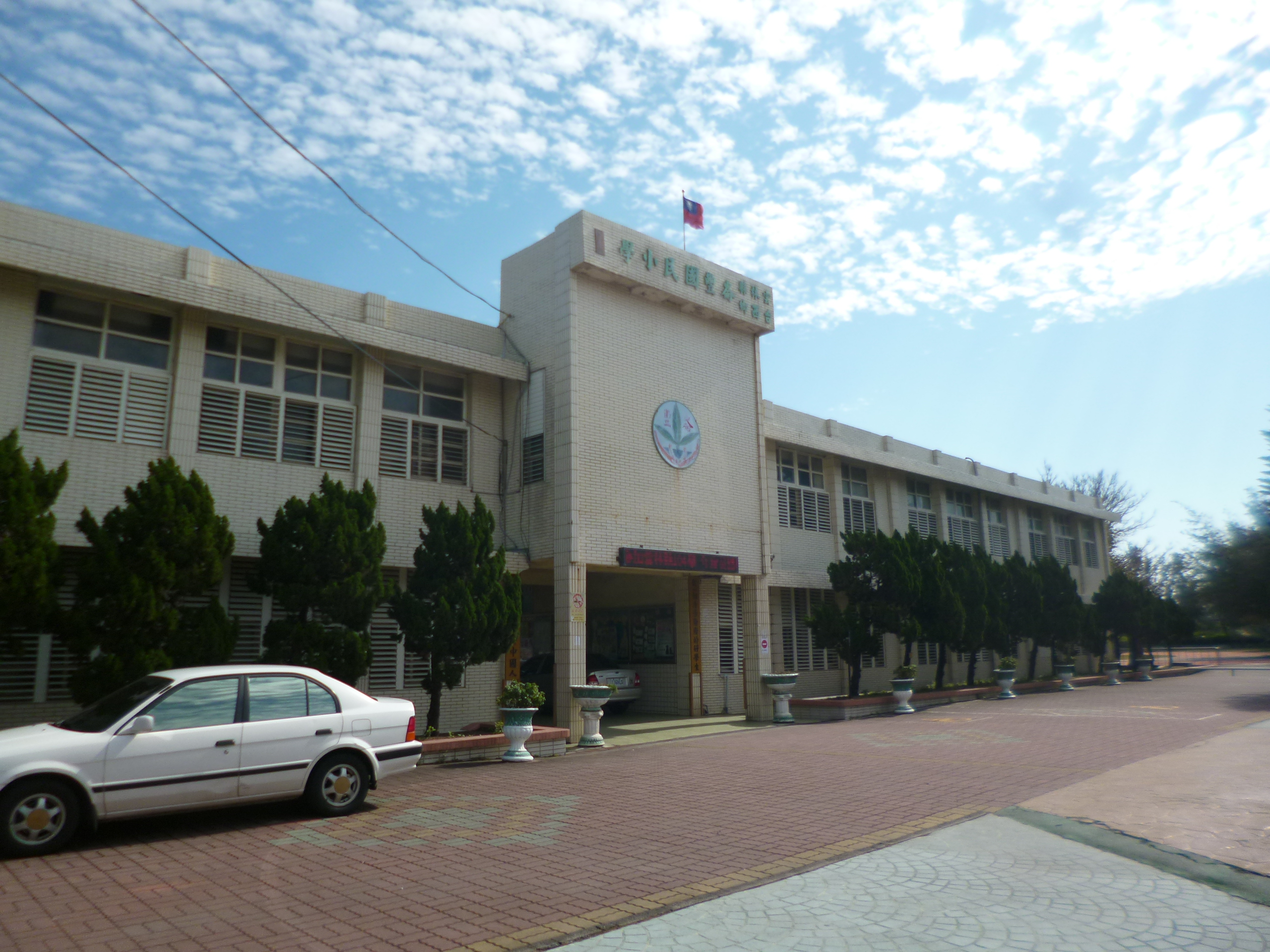 中文（台灣）: 雲林縣立崙豐國民小學，位於臺灣雲林縣臺西鄉崙豐路42號，曾經多次被颱風襲擊造成淹水停課 文言: 崙豐國民小學，居臺灣雲林縣臺西鄉崙豐路四十二號，嘗為颱風之受災者